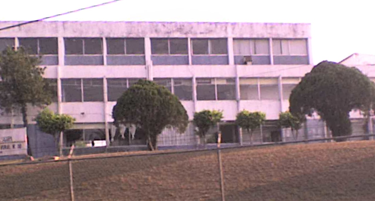 Edificio de la Ex-Comisión del Papalopan, ubicado en Cd. Alemán, Veracruz